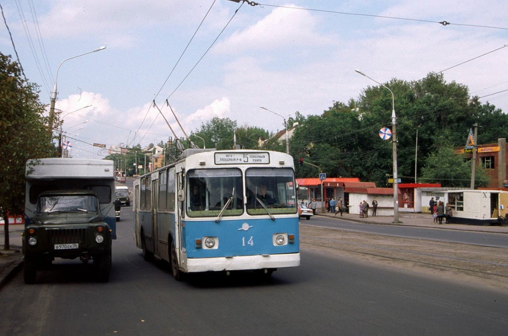 Воронежский троллейбус на Московском проспекте